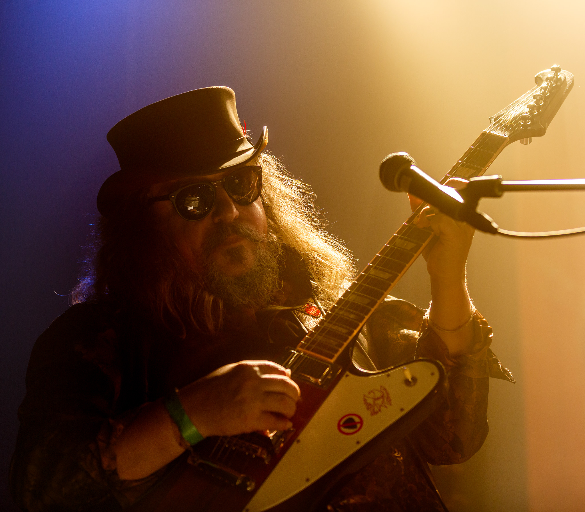 Алексей Зубарев - российский рок-музыкант, гитарист рок-группы «Аквариум»